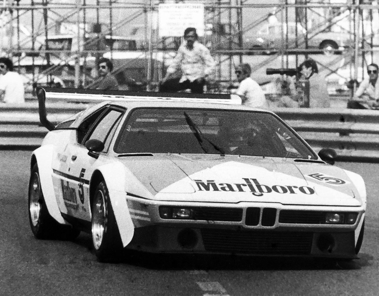 1979 BMW M1 Procar Championship Monaco race, Niki Lauda.